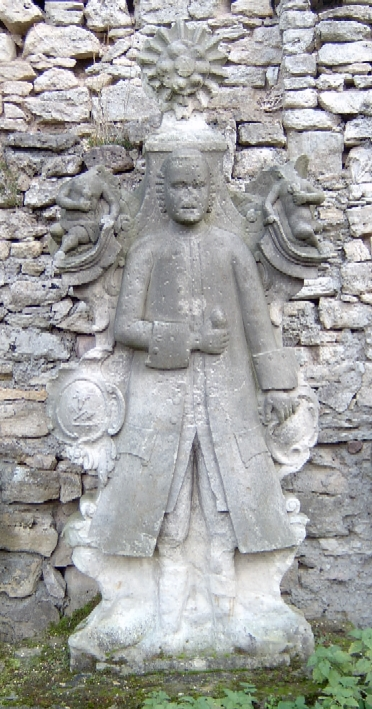 Angelroda, Thüringen. Im Garten hinter der Kirche findet man einen alten Gedenkstein für den Schlachtermeister Barth. Noch im 18. Jahrhundert gab es in Angelroda 10 Zitronenhändler und Fuhrleute, die Thüringer Waren nach Norddeutschland schafften und von dort u.a. Flachs und Heringe mitbrachten.